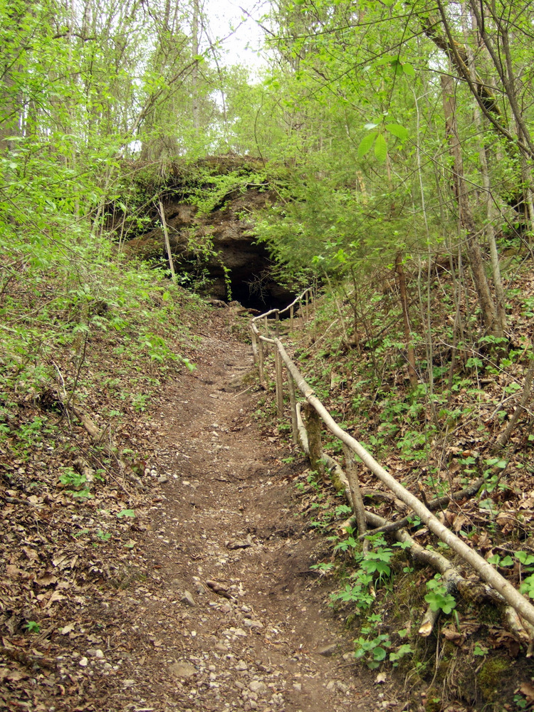 Skališkių ola netoli Liucionių kaimo